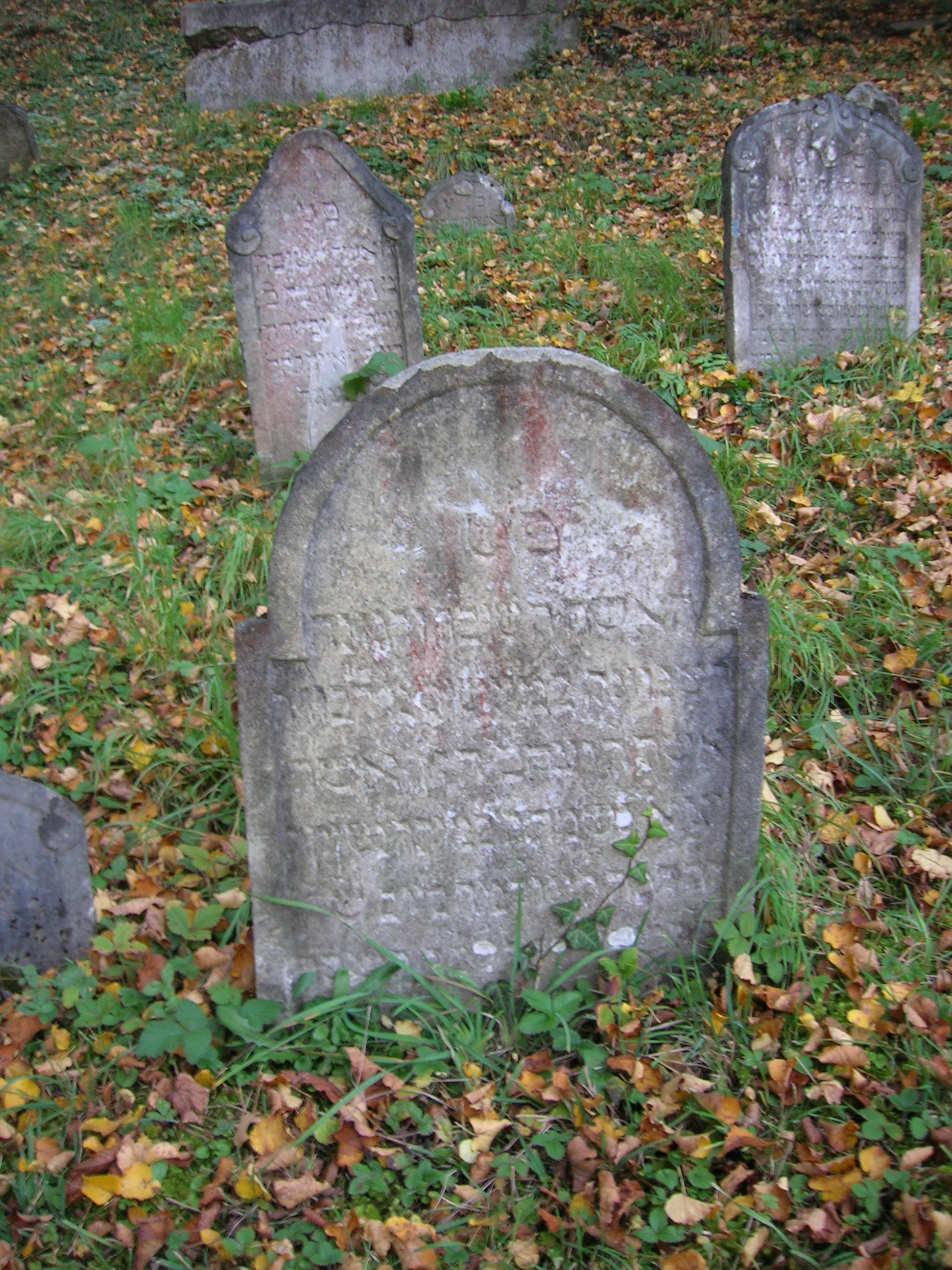 Lomnice (okres Brno-venkov), židovský hřbitov